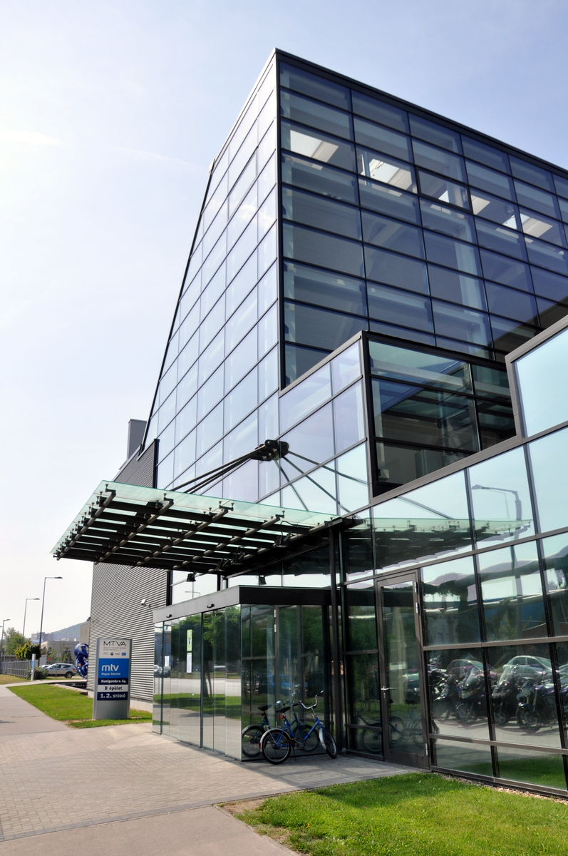 a Magyar Televízió új székháza, 1037 Budapest, Kunigunda útja 64.